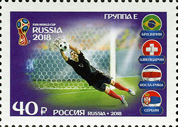 Группа Е.